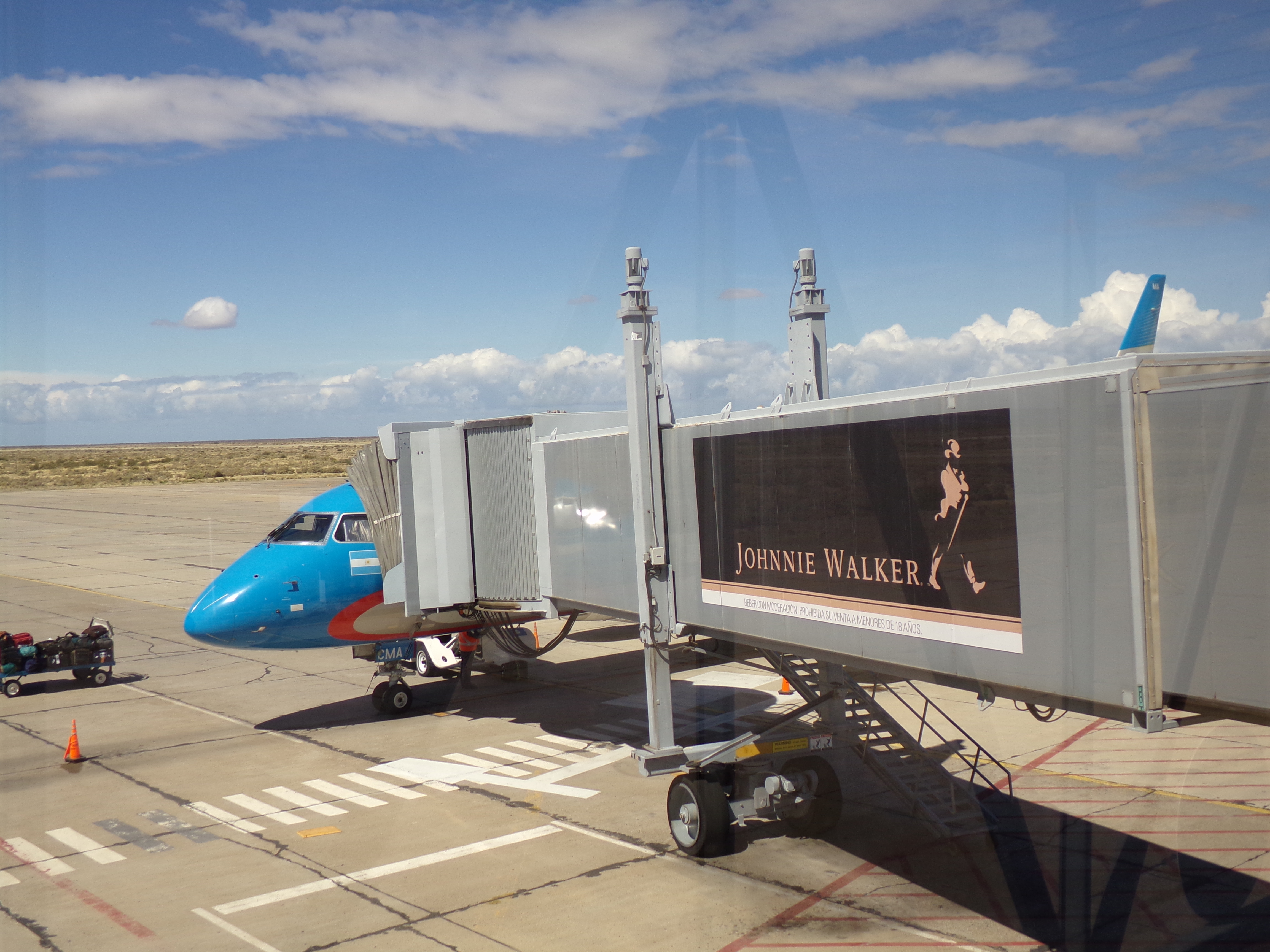 LV-CMA en Trelew